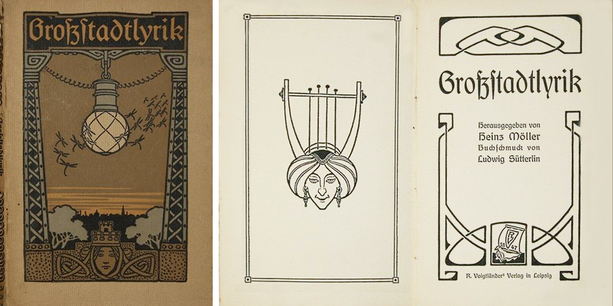 Buchgestaltung "Großstadtlyrik": Umschlag, Frontispiz und Innentitel